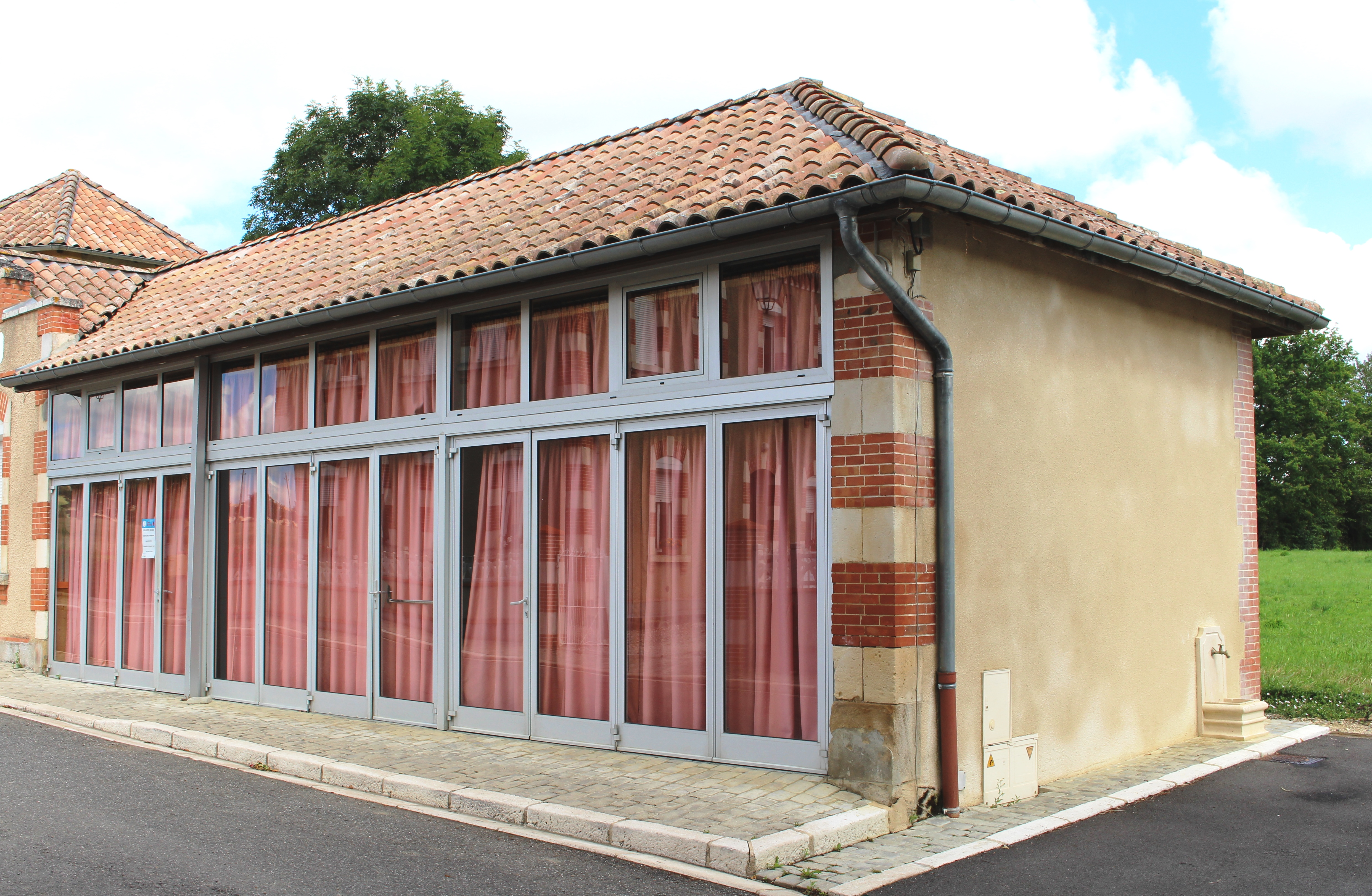 Salle des fêtes de Devèze (Hautes-Pyrénées)